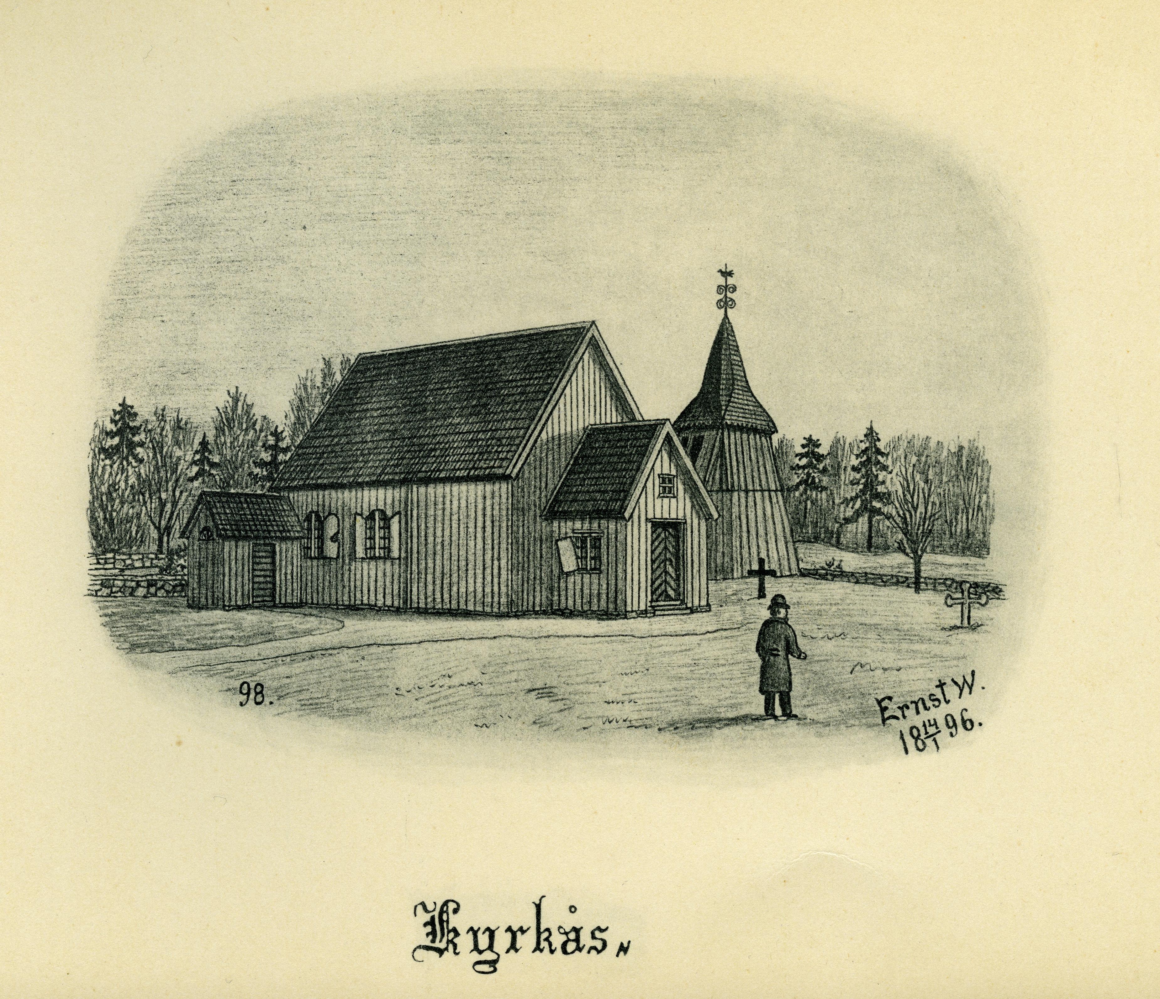 Kyrkås kyrka år 1896 i Barne härad, Skara stift, Västergötland, Sverige. Teckning av Ernst Wennerblad ur Skara stifts kyrkor (1902).